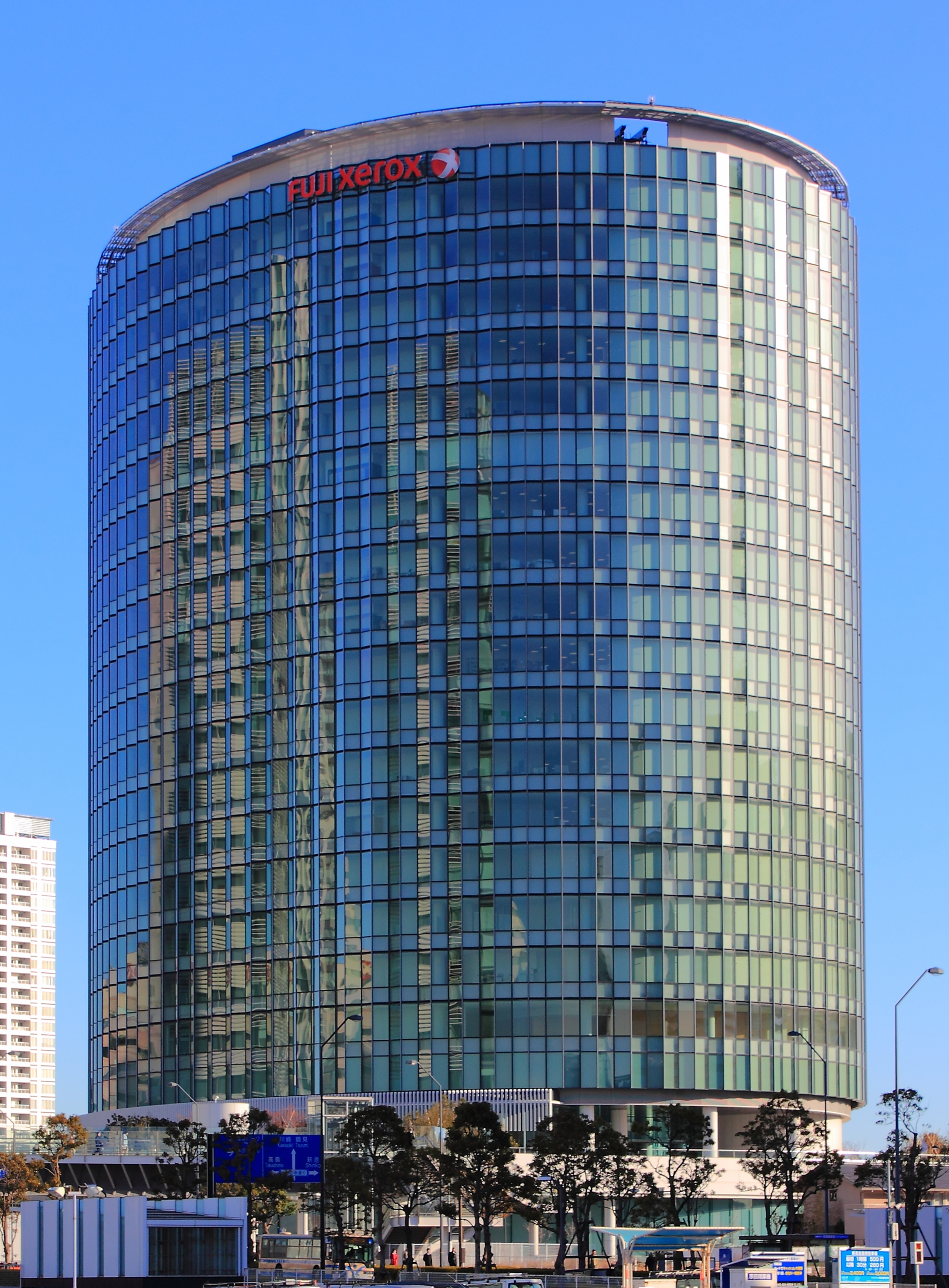 富士ゼロックスR&Dスクエア（神奈川県横浜市西区）